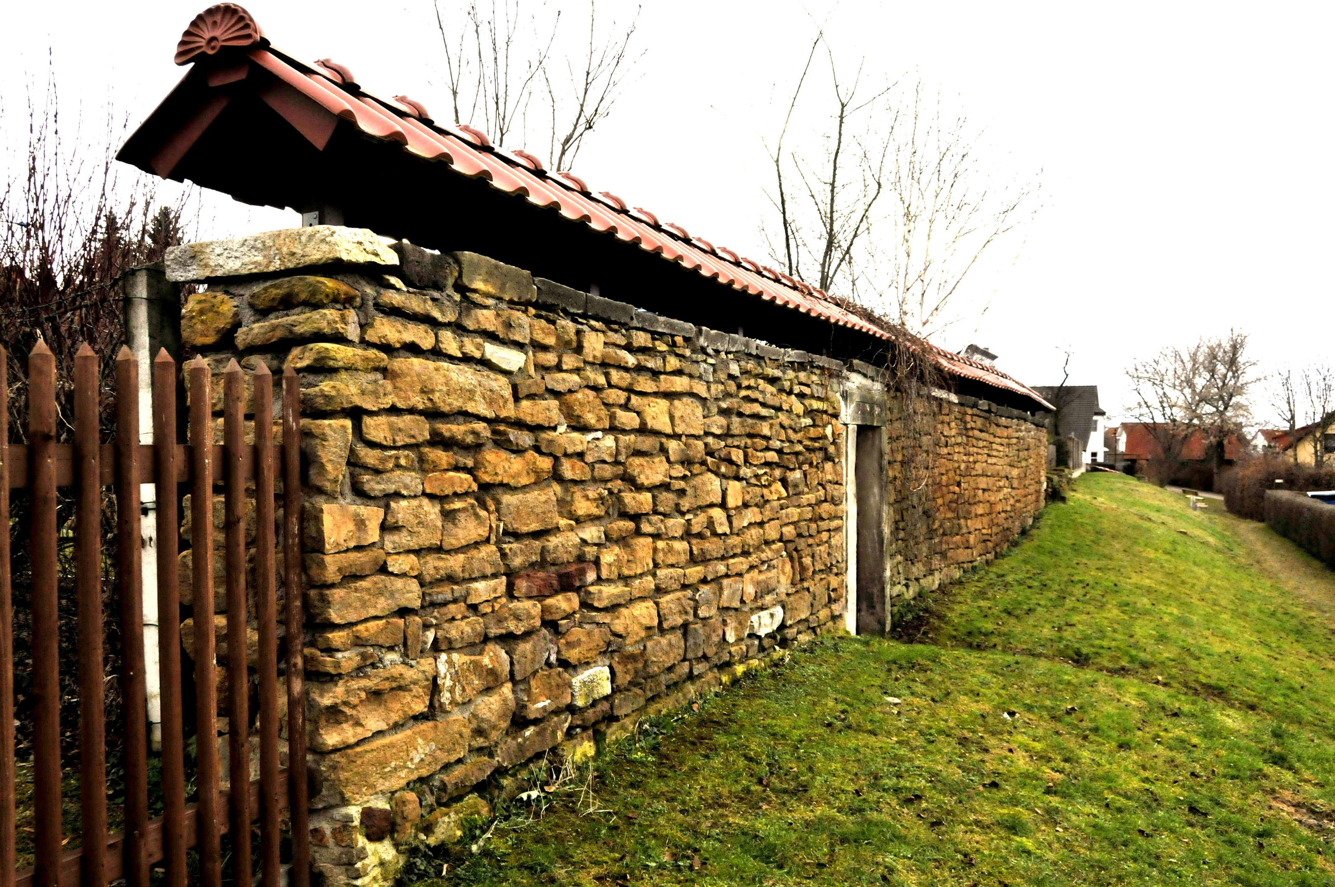 Kornhochheim, alte Dorfmauer